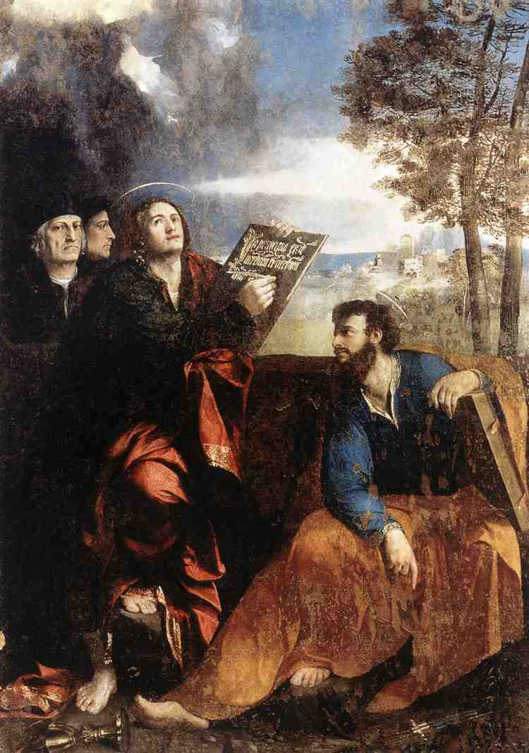 Sts John and Bartholomew with Donorslabel QS:Len,"Sts John and Bartholomew with Donors"label QS:Luk,"Доссо Доссі (бл. 1490–1542), 1527 р. «Св. Іван євангеліст, Св. Вартоломей і донатори», Національна галерея старовинного мистецтва (Рим)"